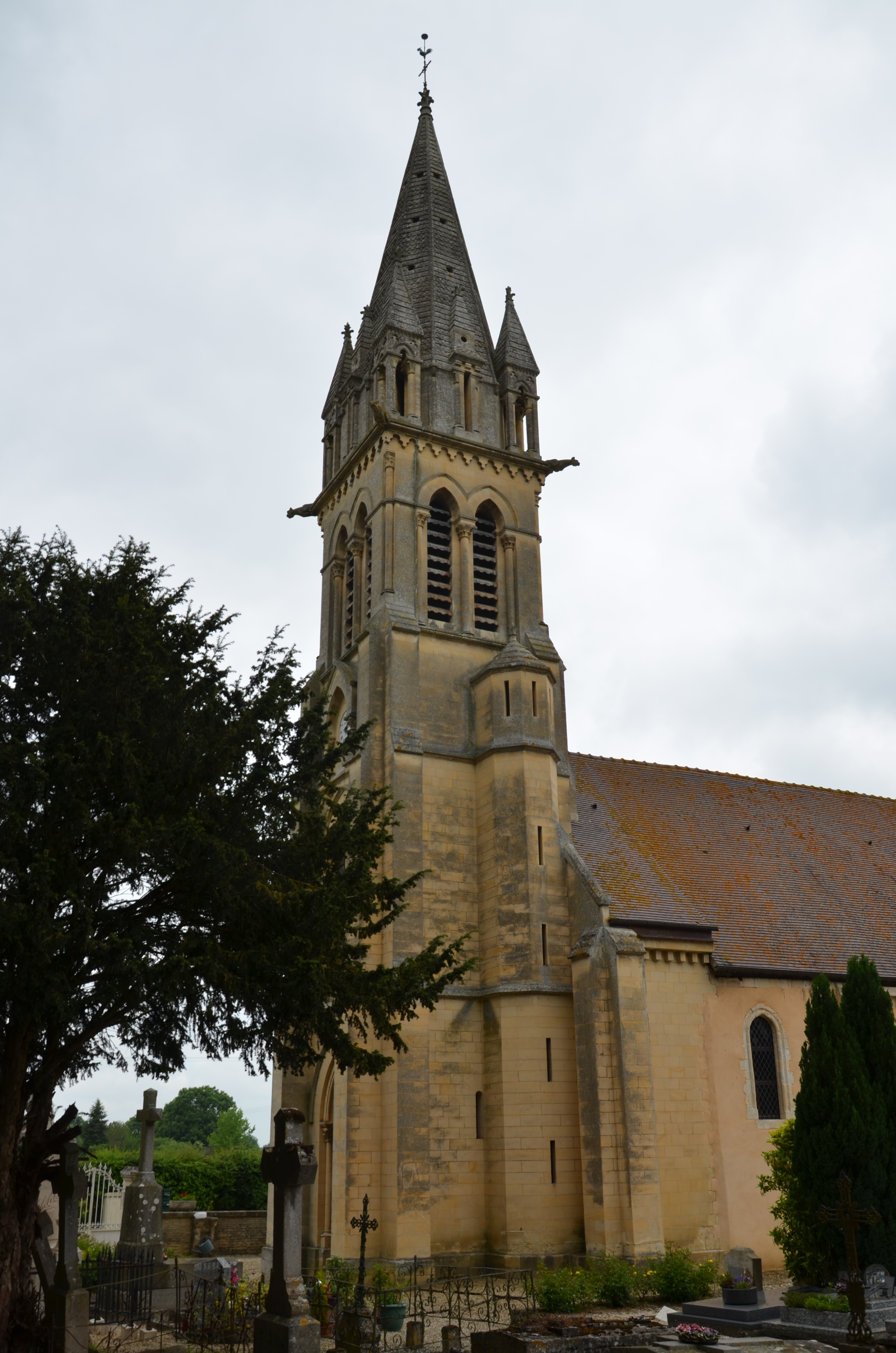 Église Saint-Germain de Magny-le-Freule.